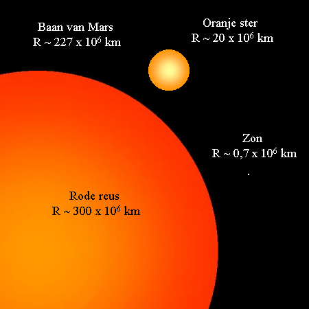 Gemaakt door x@ndr Rode reus tov zon en oranje ster